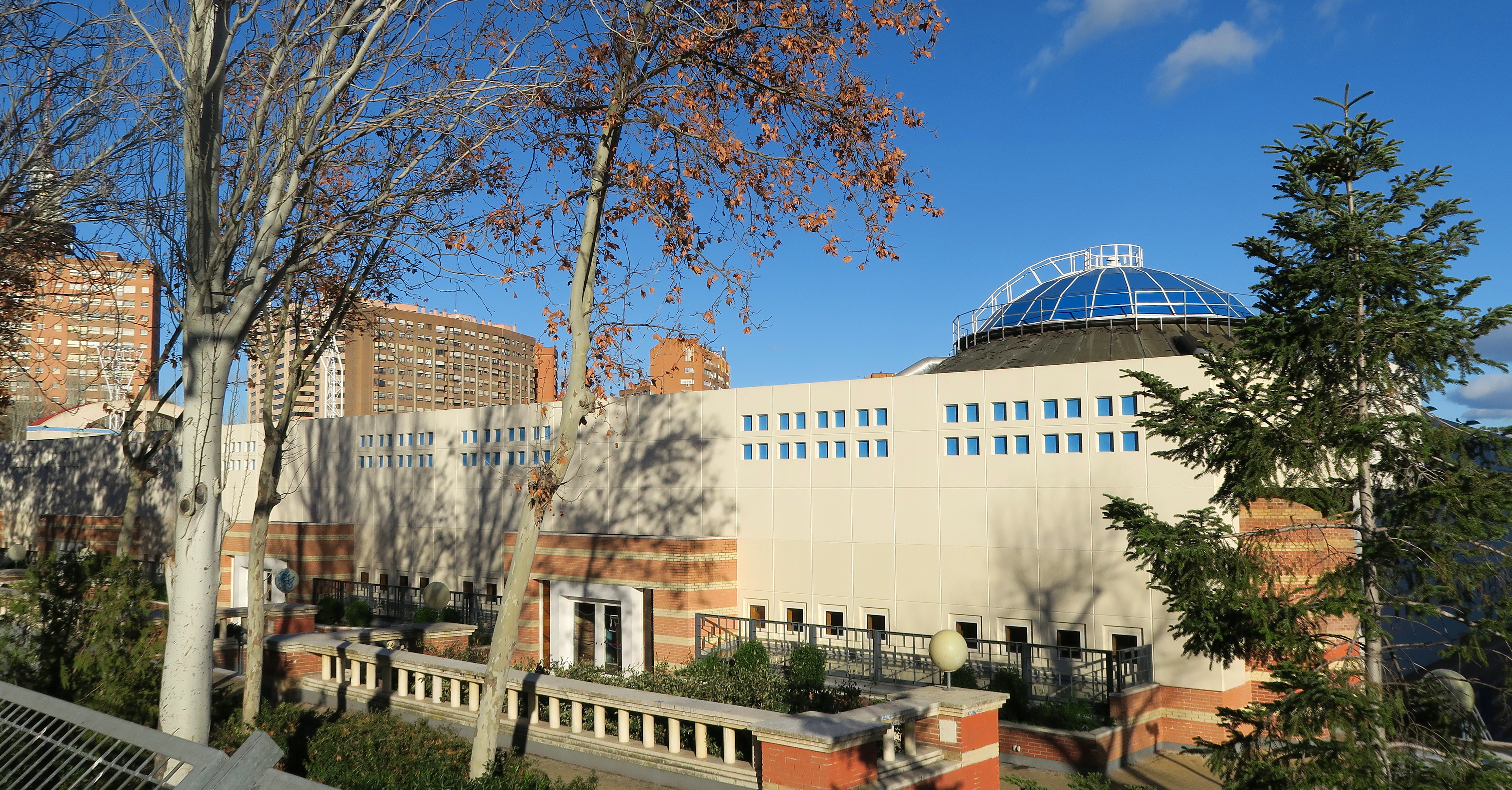 Centro de Natación M-86